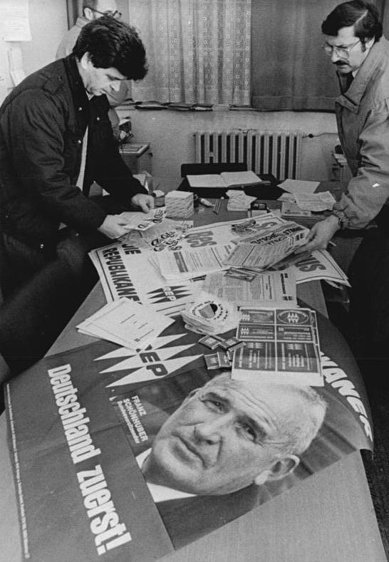 Leipzig, beschlagnahmtes rechtsradikales Werbematerial ADN-ZB Gahlbeck 16.1.90 Leipzig: Nazi-Material Neofaschistische Parteien und Organisationen und deren DDR-Symphatisanten treten bei den Montags-Demonstrationen immer stärker in Erscheinung. Vertreter der Vereinigten Linken und die Kriminalpolizei stellten umfangreiches Werbematerial der Republikaner, DVU, NDP und Gruppe 146 sicher.